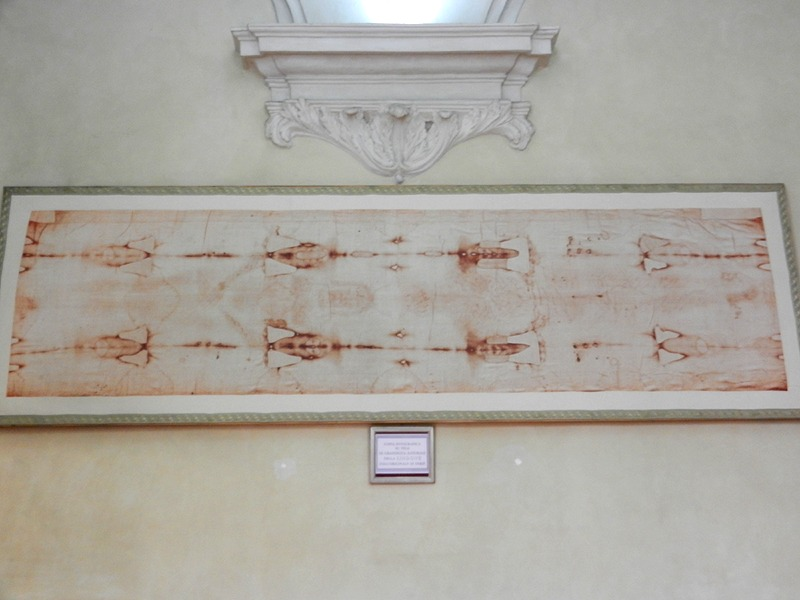 Torino - Copia della Sacra Sindone esposta nella sagrestia della Chiesa di S. Lorenzo